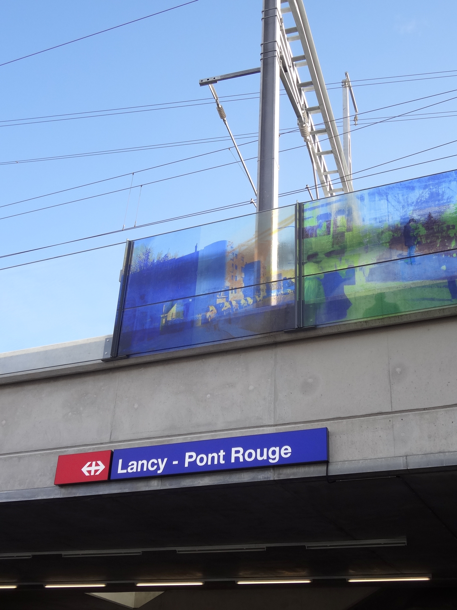 Vue d'un détail de la gare de Lancy-Pont-Rouge peu avant sa mise en service le 10 décembre 2017.